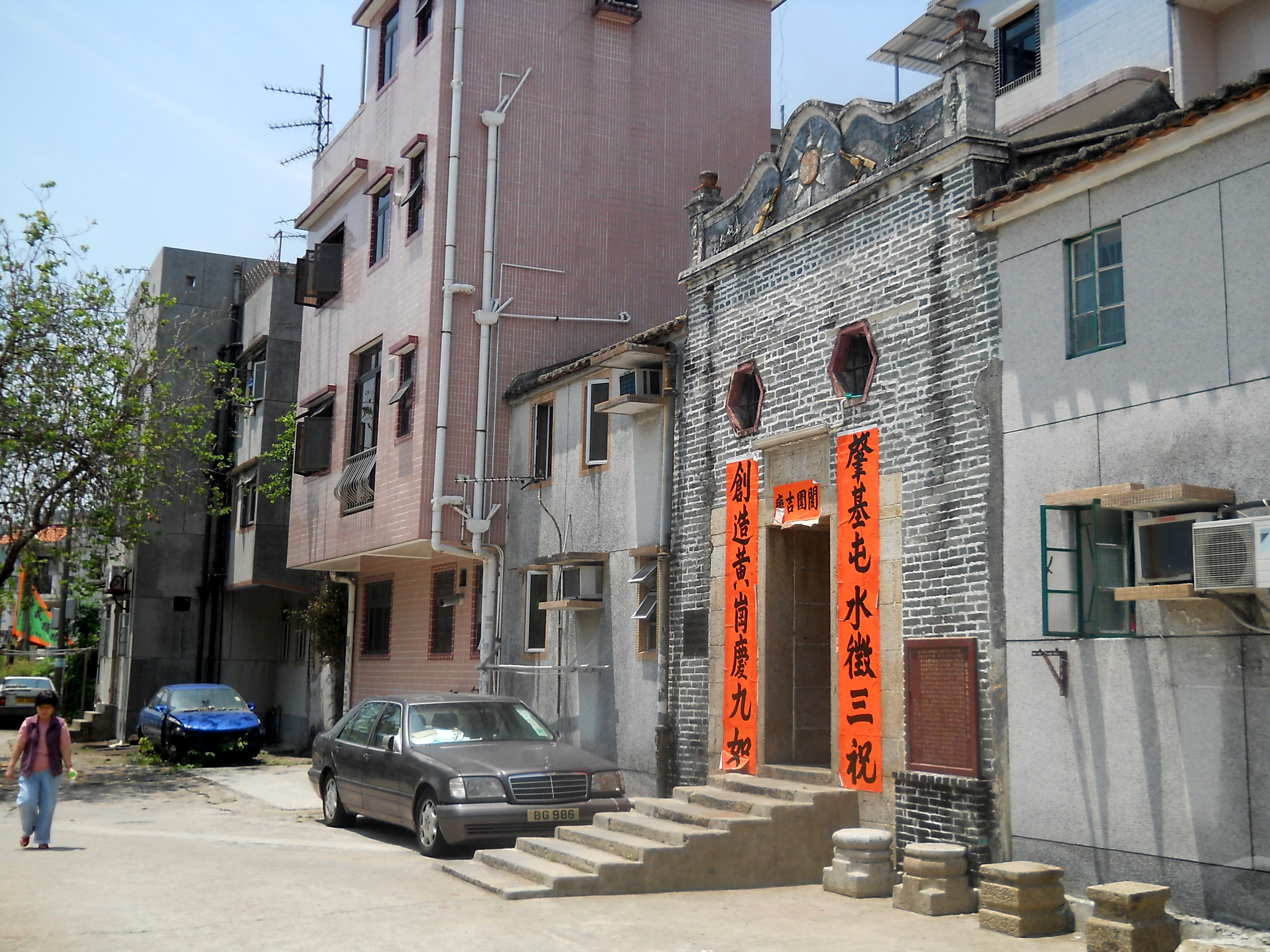 中文（香港）: 藍地泥圍